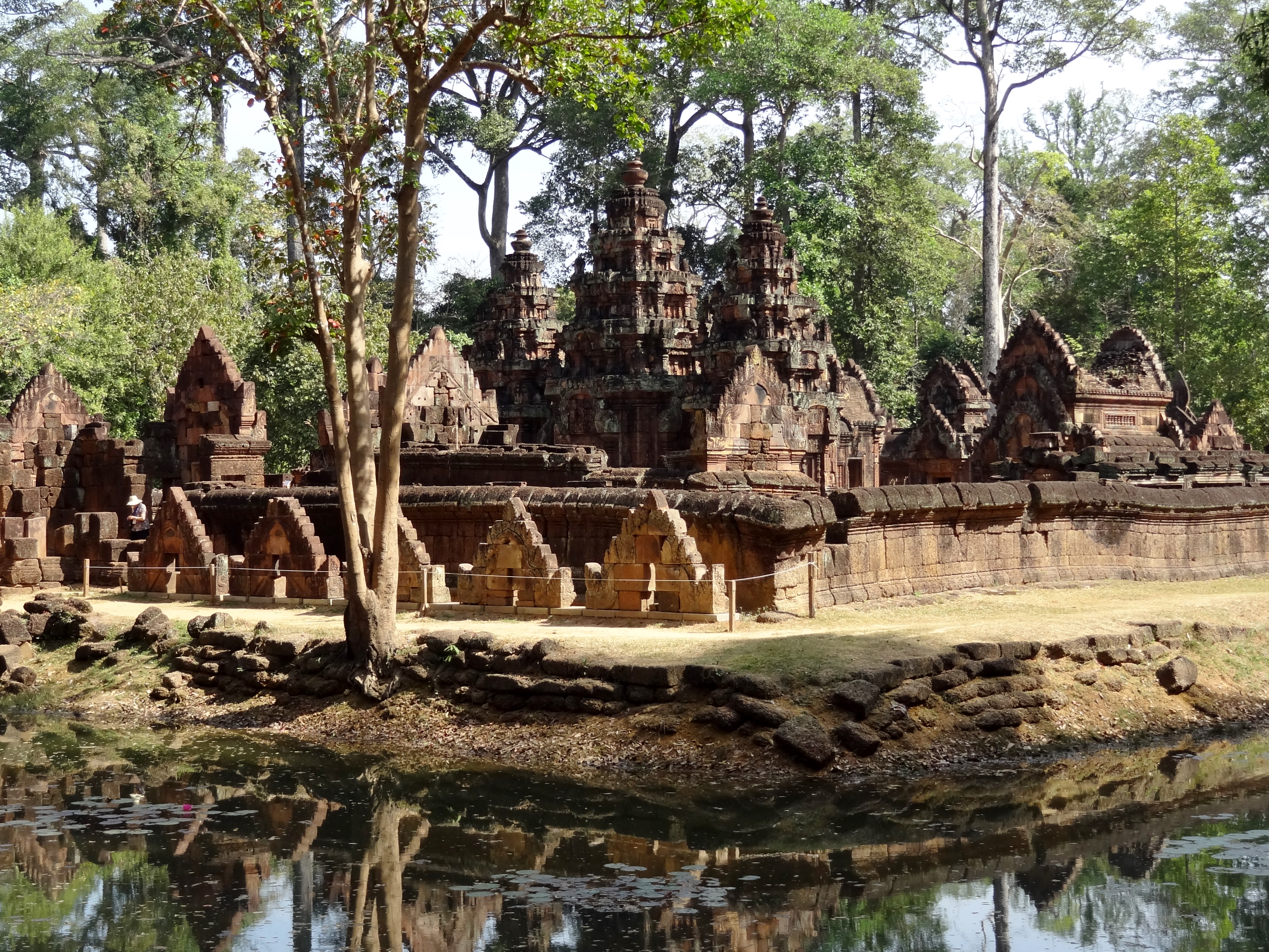 Banteay Srei (ប្រាសាទបន្ទាយស្រី ‚Zitadelle der Frauen‘), ursprünglich Tribhuvanamahesvara (‚Großer Gott der dreifaltigen Welt‘), Provinz Siem Reap, Kambodscha